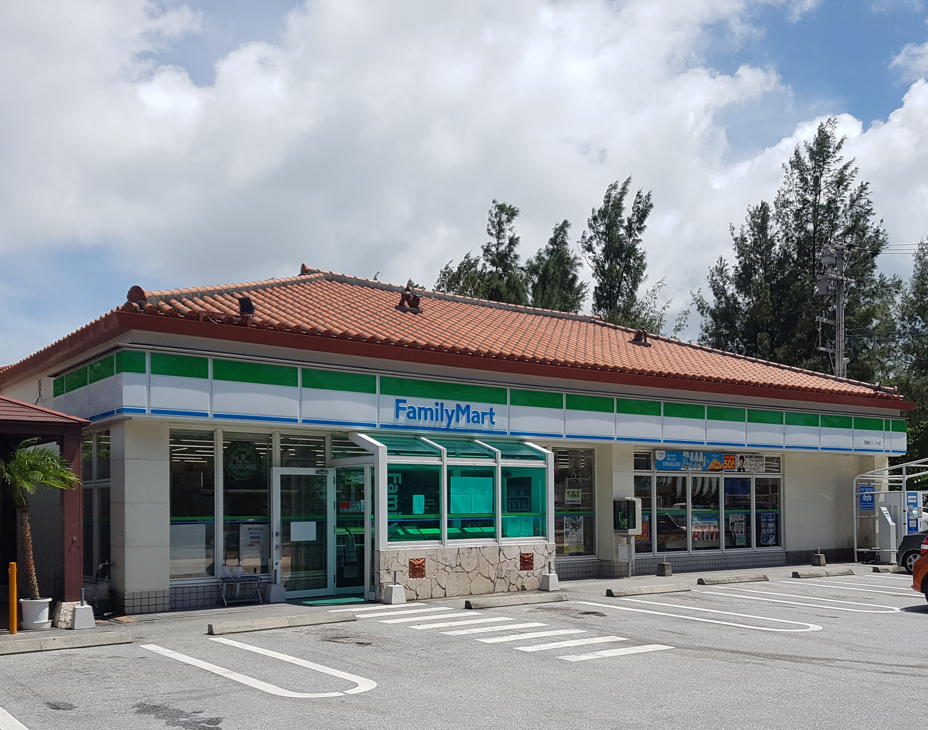 沖縄県恩納村にあるファミリーマート恩納たんちゃ店。